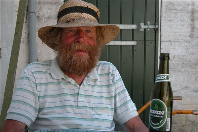 En Hjortøbo